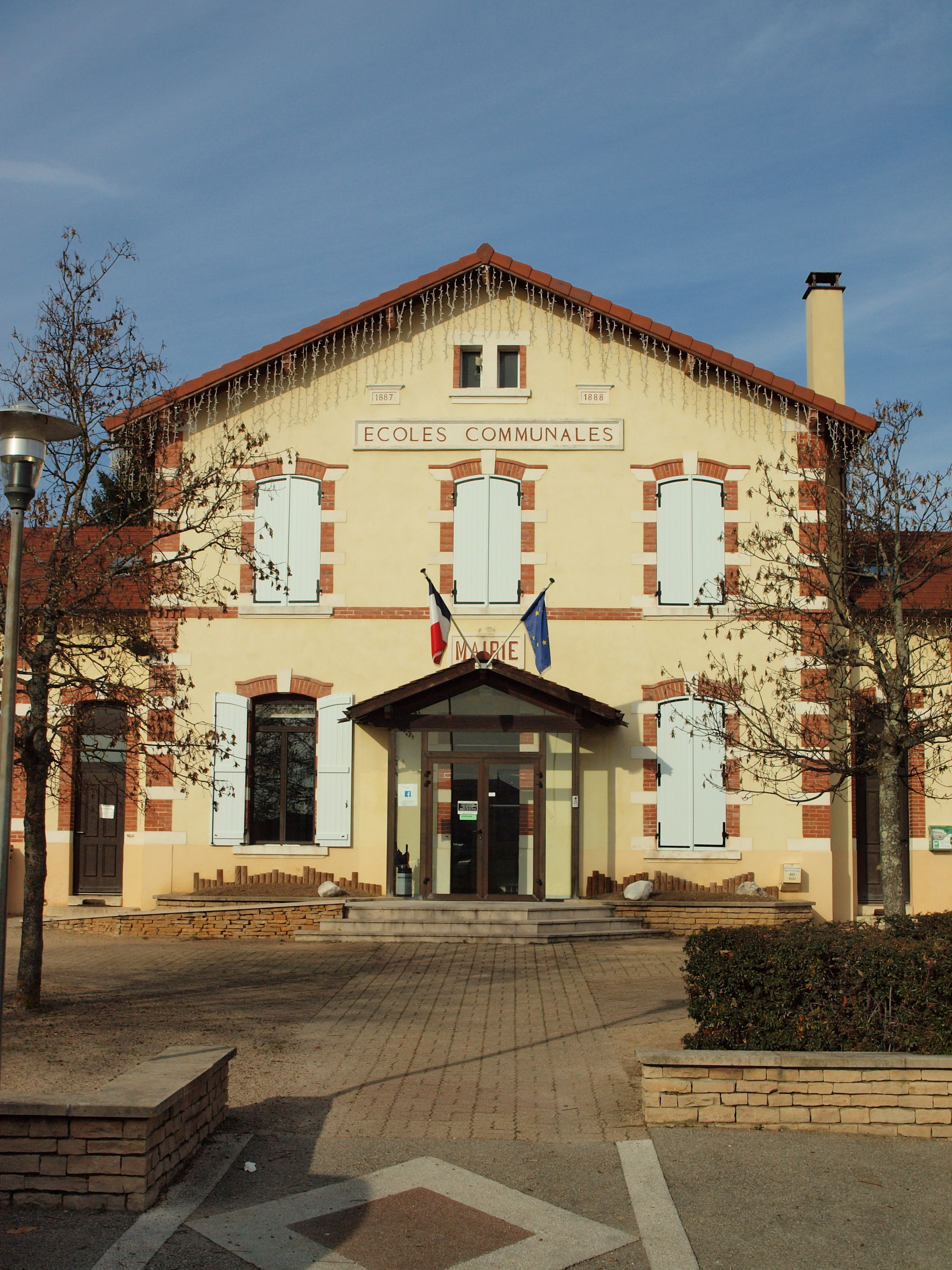 Maubec (Isère, France)